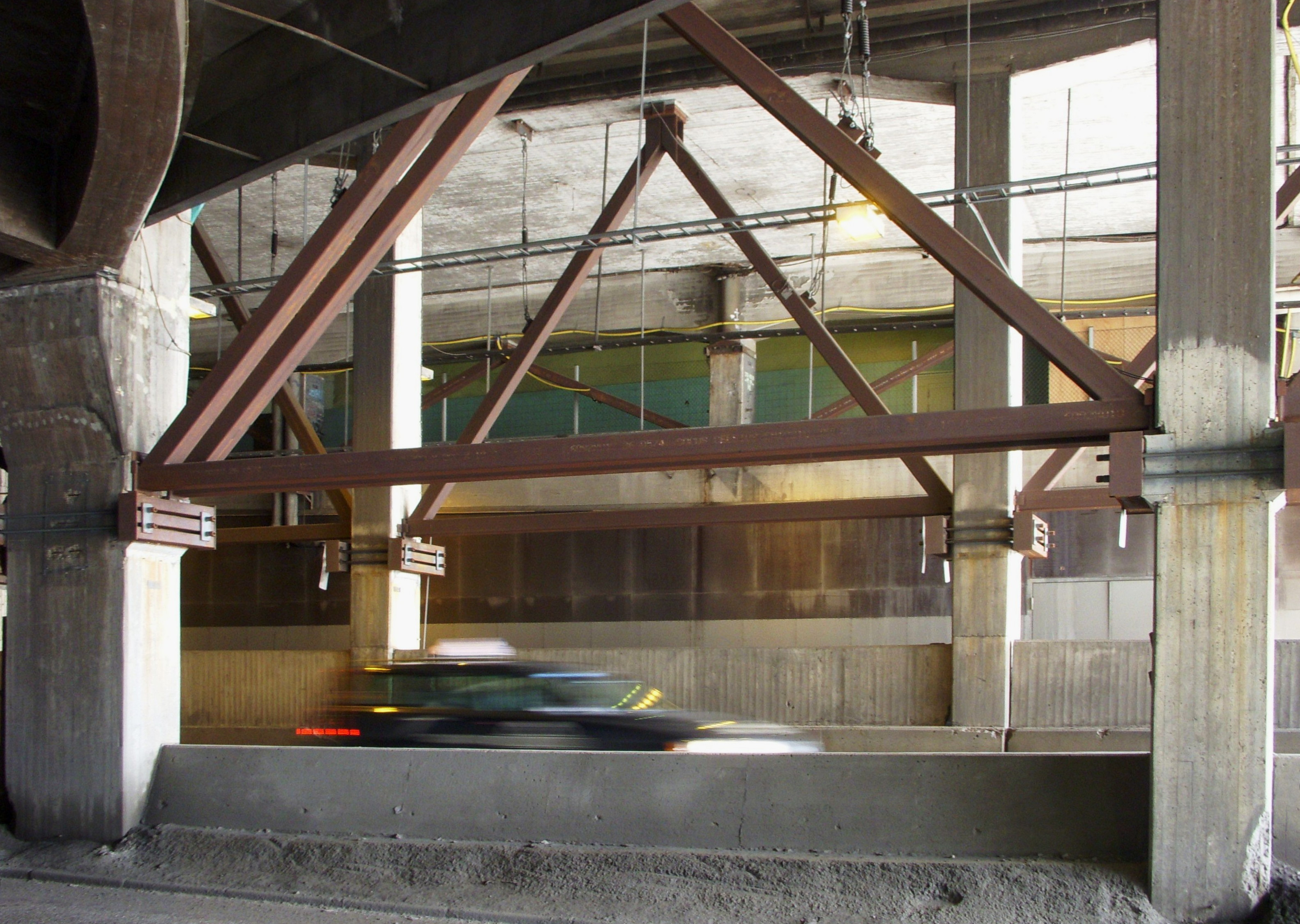 Slussen, Stockholm, inventering april 2009